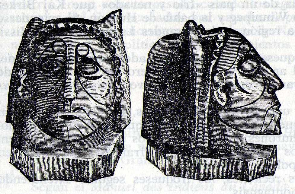 Grabado que representa una pipa de piedra con forma de cabeza humana de la cultura iroquesa